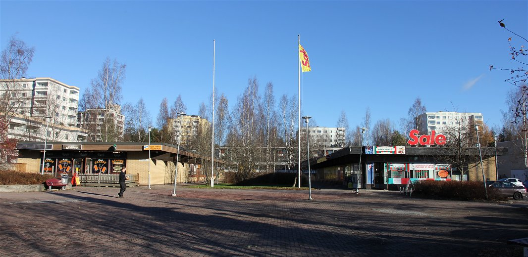 Särkiniemen ostari Kuopion Särkiniemessä (Rimpitie 2).